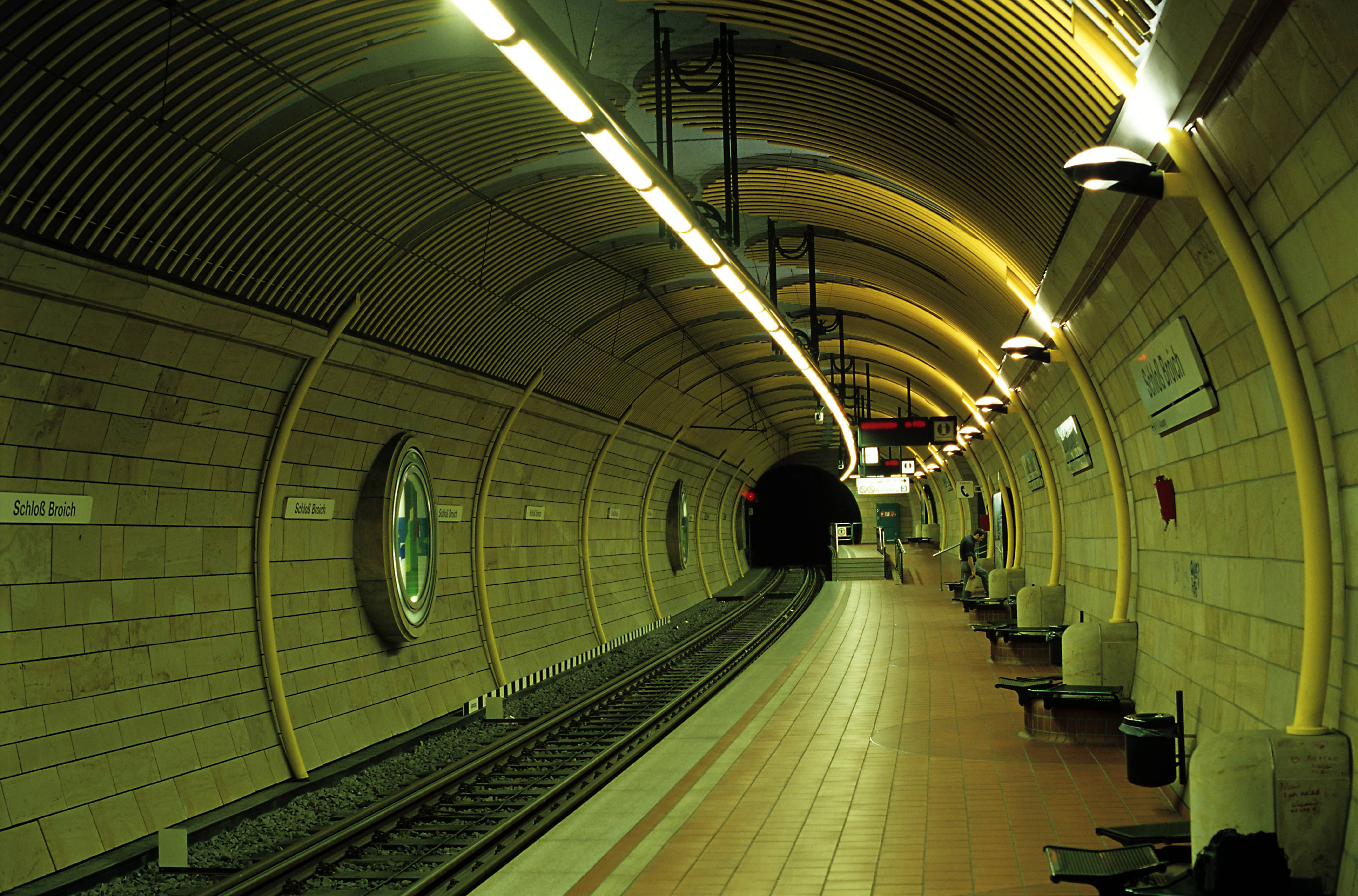 Der Hp ist nach Voll-U-Bahn-Normen gebaut worden, nur der Bahnsteig wurde abgesenkt. Das asymmetrische Vierschienengleis gleicht die unterschiedlichen Wagenbreiten aus.